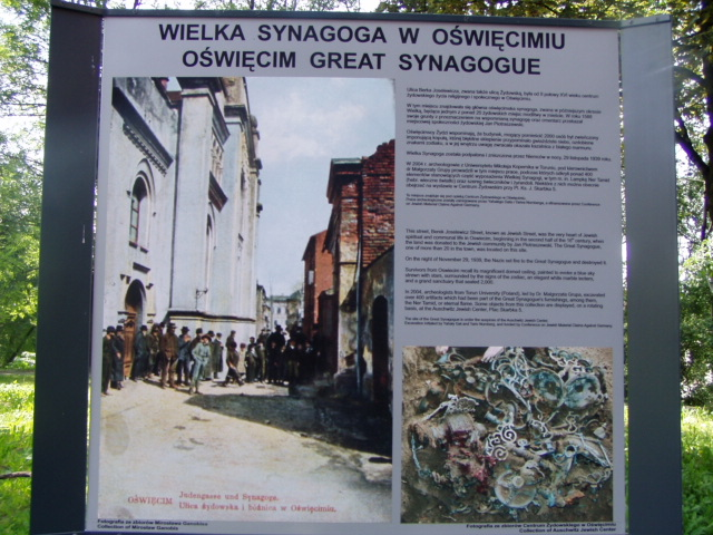 Great Synagogue in Oświęcim